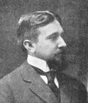 Lucien Moreau.